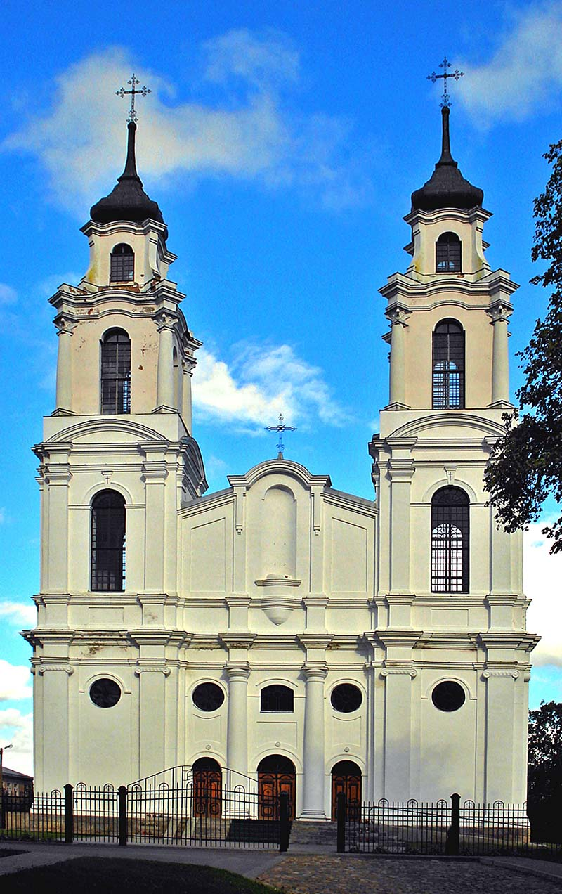 Neitsi Maarja Taevaminemise roomakatoliku kirik Lutsis II eeslinnuse territooriumil.